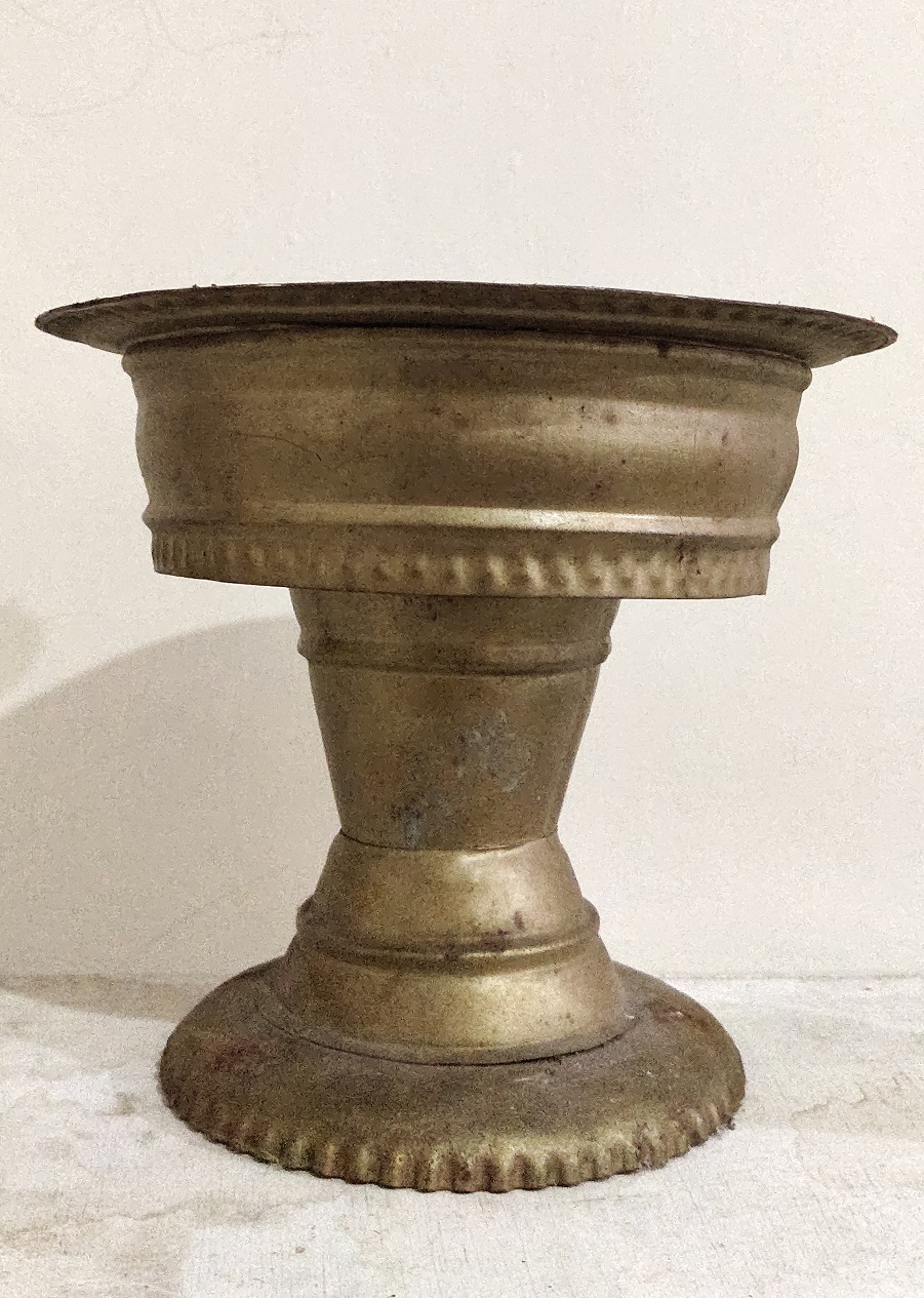 Carano berbentuk dulang berkaki dari kuningan. Di dalamnya berisi daun sirih, kapur, gambir, pinang, dan tembakau.